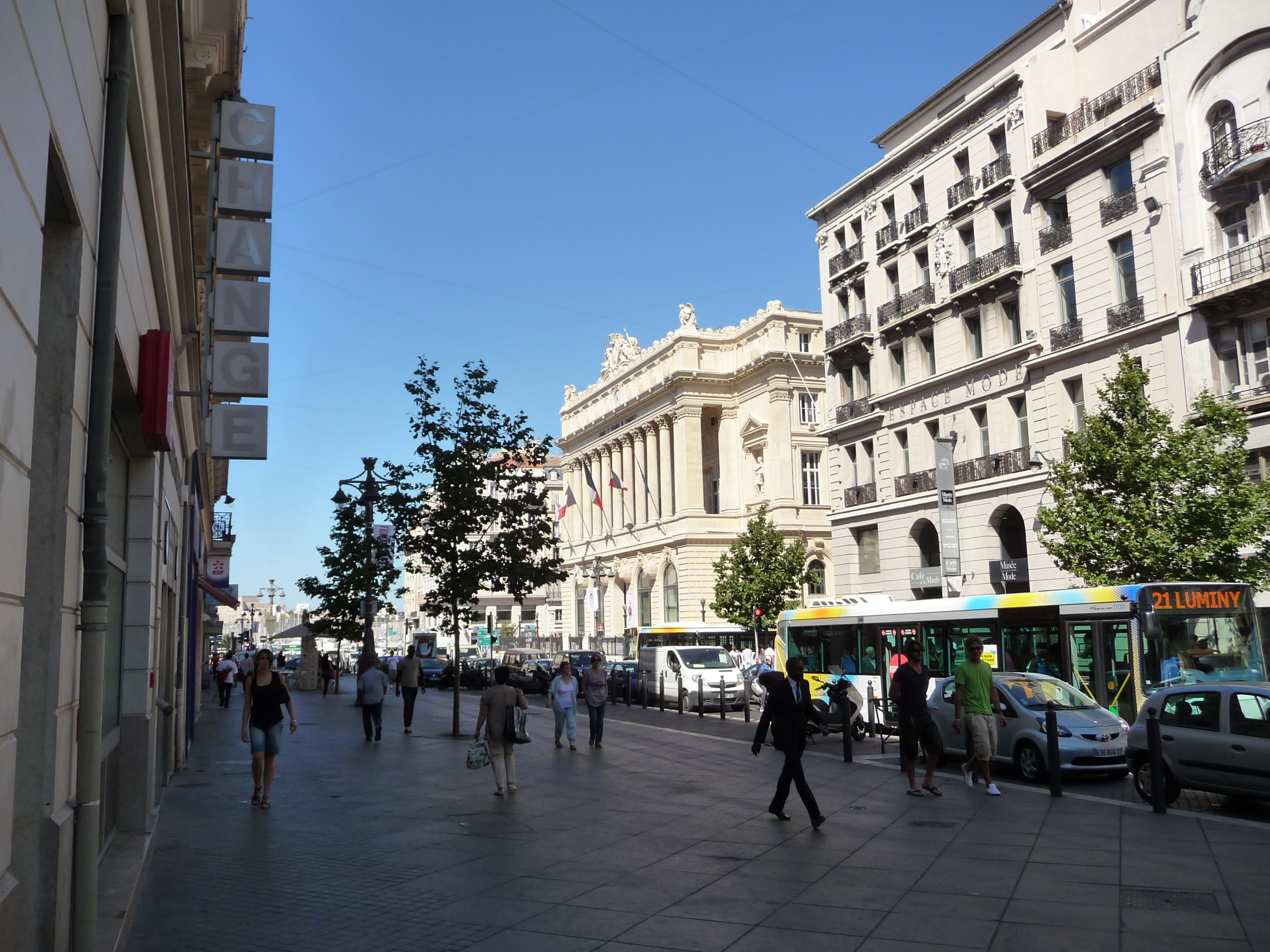 La Canebiere, Marseille